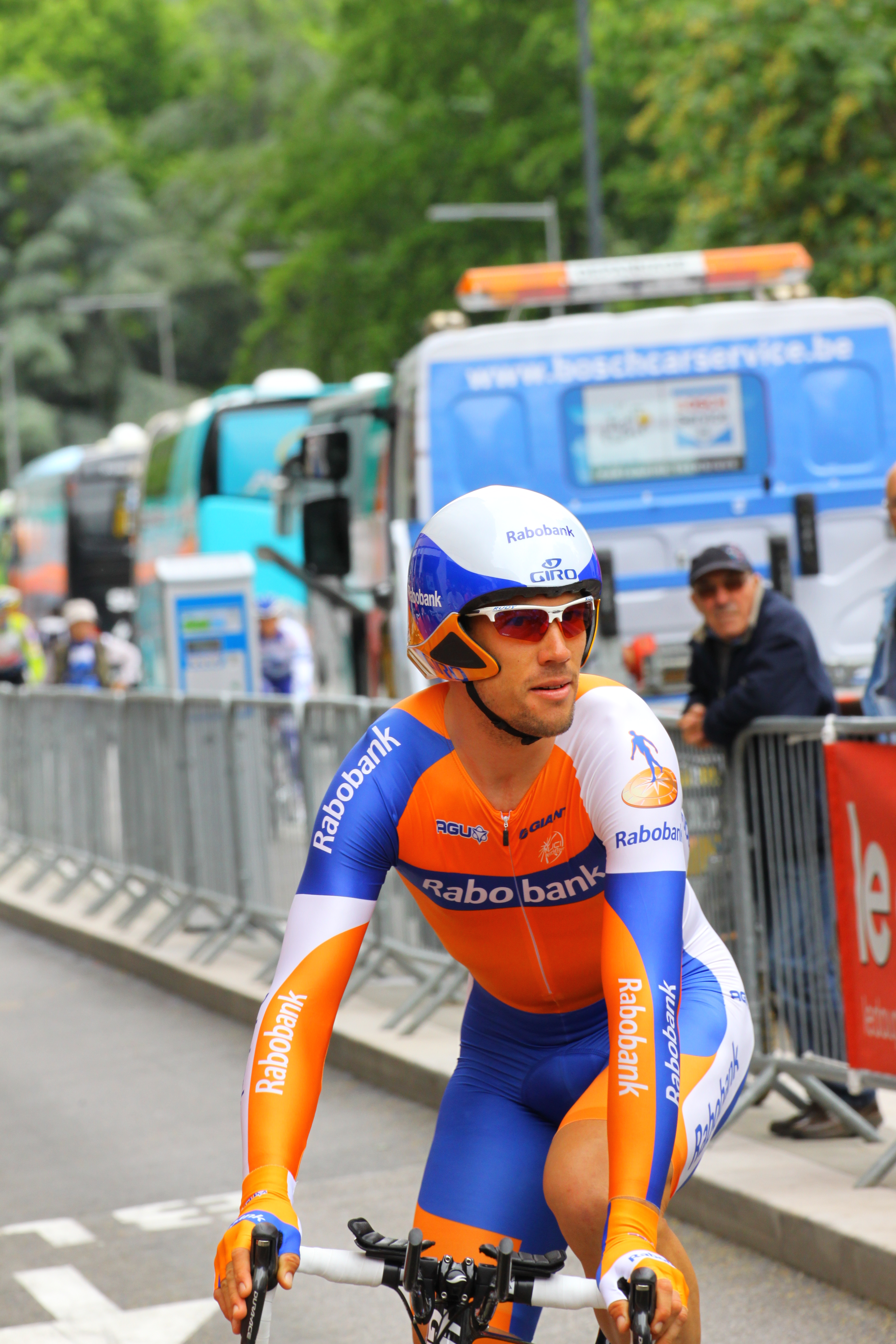 Maarten Tjallingii au départ du contre-la-montre du Critérium du Dauphiné 2011 à Grenoble